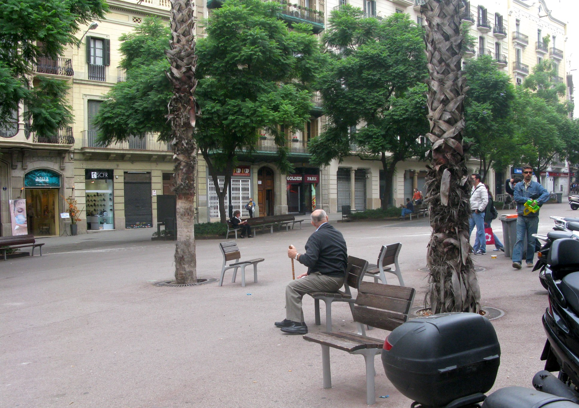 Barcelona Gràcia 056